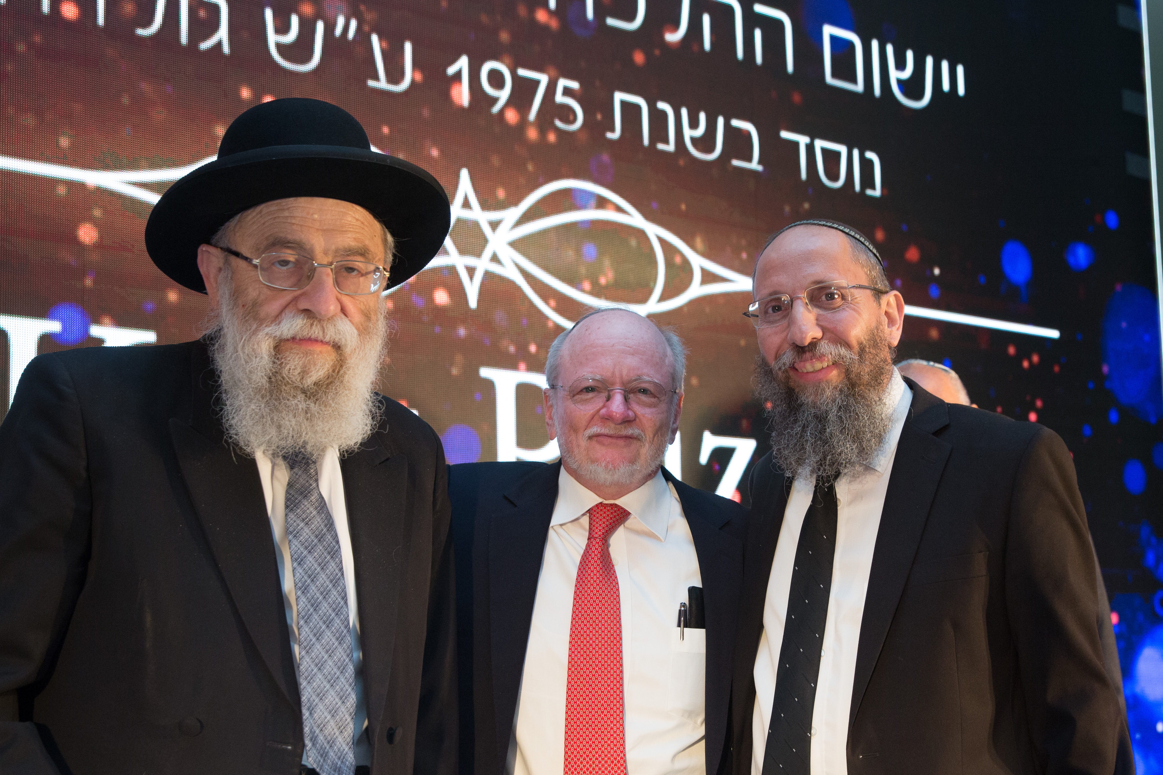 צילום של הרב רימון בטקס פרסי כץ תשע"ח